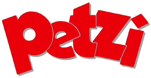 Logo de la bande dessinée Petzi, version Casterman (belge)